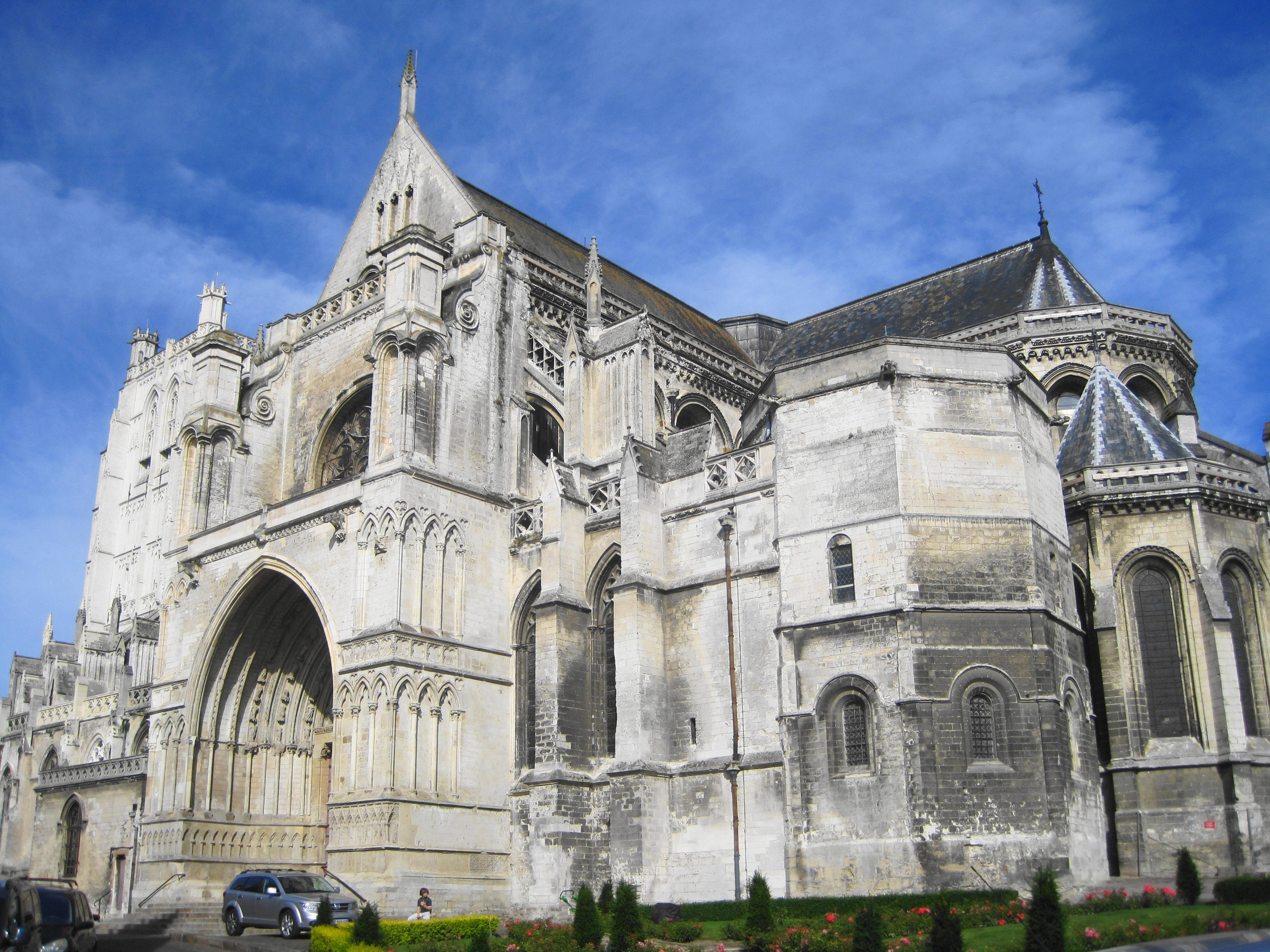 Cathédrale Notre-Dame de Saint-Omer (Pas-de-Calais), France.